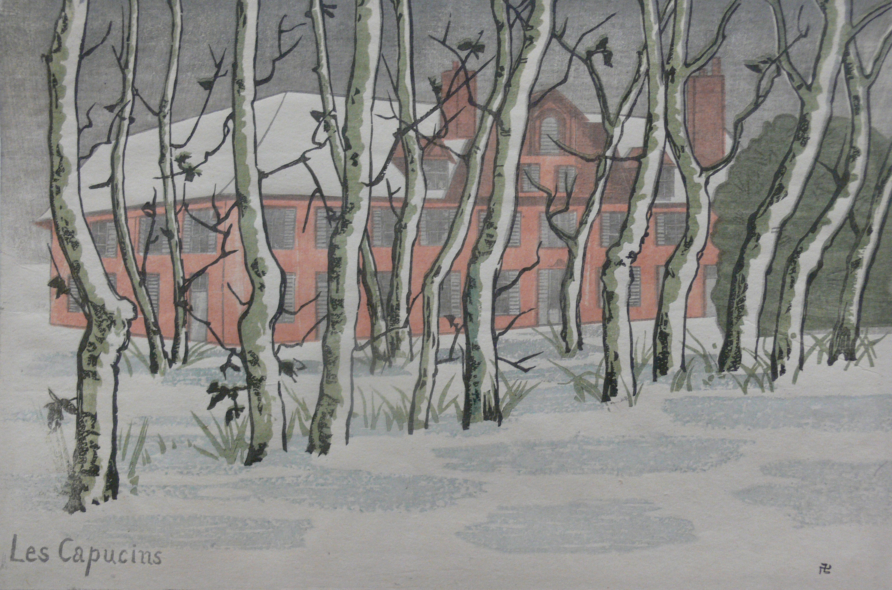 Prosper-Alphonse Isaac (1858-1924), « Les Capucins » à Montfort l'Amaury, gravure sur bois à la manière japonaise, 22,4 x 34 cm